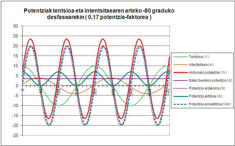 Aldiuneko potentzia elektrikoa korronte alternoko sistema batean eta bere deskonposaketa potentzia aktibo eta potentzia erreaktiboan; tentsioa eta korrontearen arteko desfasea -80 gradukoa denean.